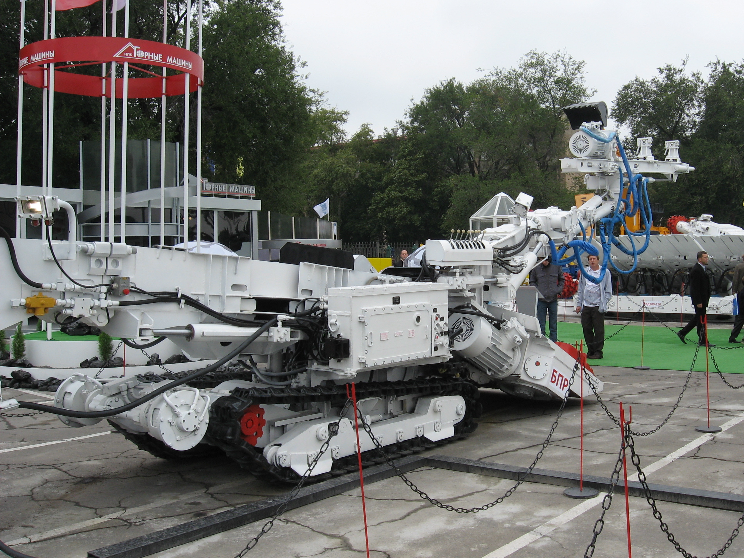 Фото з виставки Вугілля-Майнінг 2010